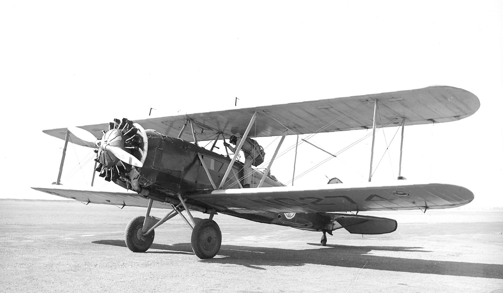 BoeingSchoolBoeing40B